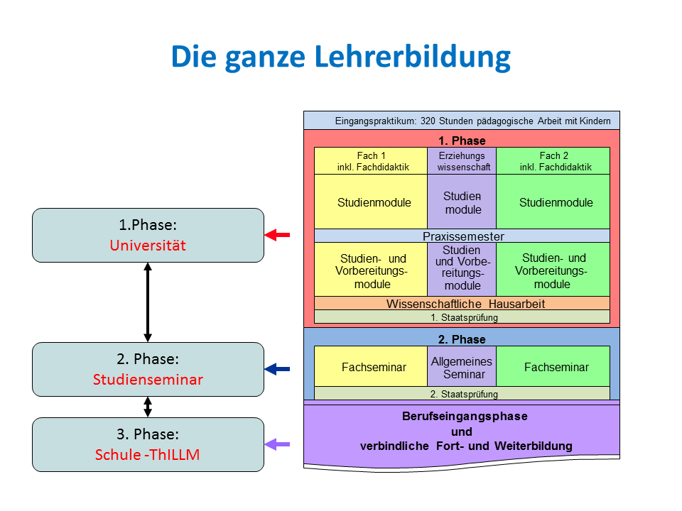 Stuktur des Jenaer Modells